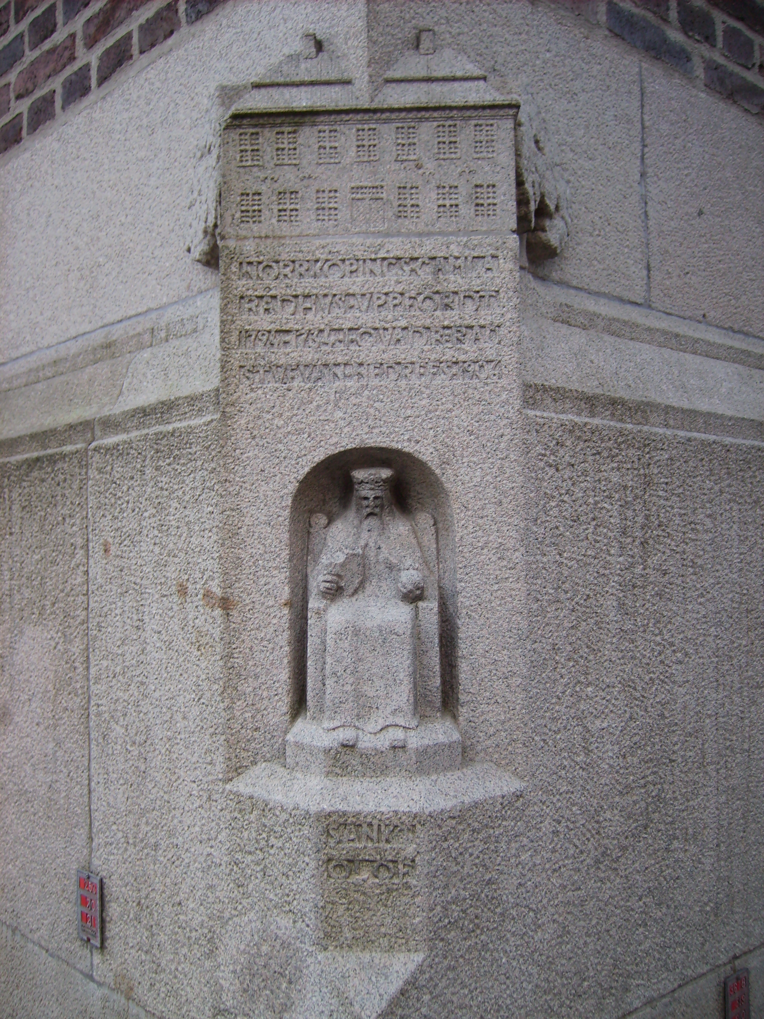 Bilden är fotograferad av Harri Blomberg. Photo by Harri Blomberg.